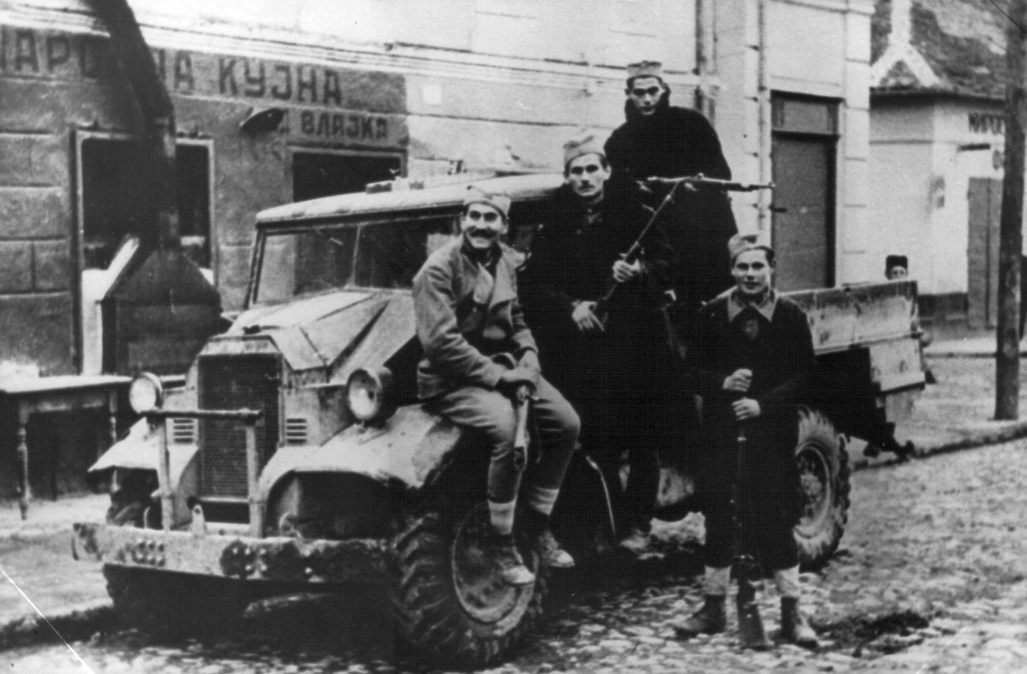 Srpskohrvatski / српскохрватски: Grupa boraca čačanskog partizanskog odreda na zaplenjenom nemačkom kamionu u borbama za oslobođenje Čačka. Slikano septembra ili oktobra 1941.